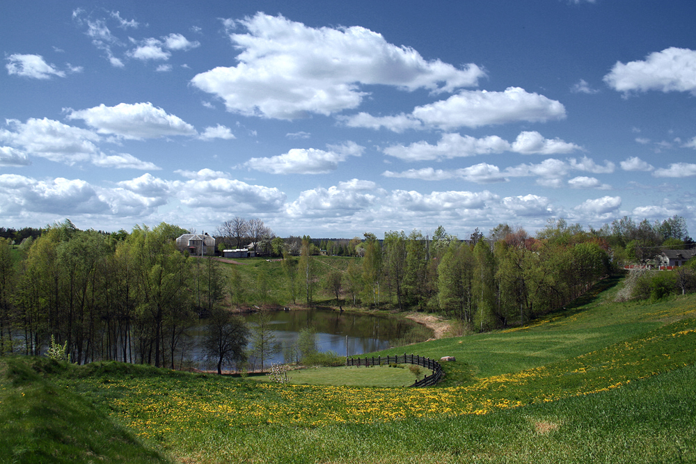 Gaj-Grzmięca